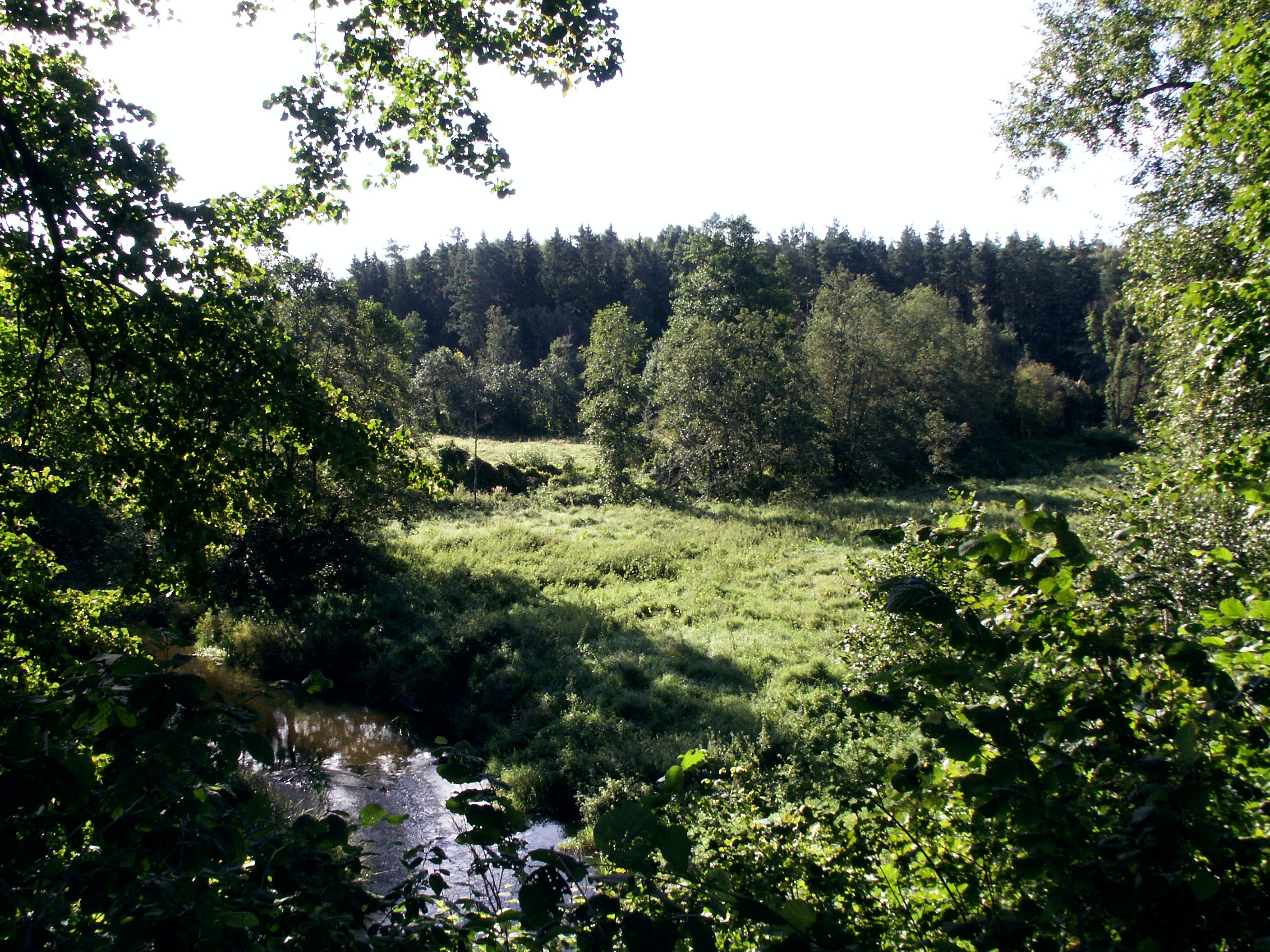 Vilcė, Latvija